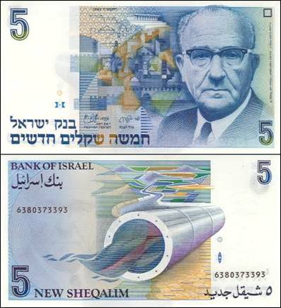 סריקה של שטר כסף.